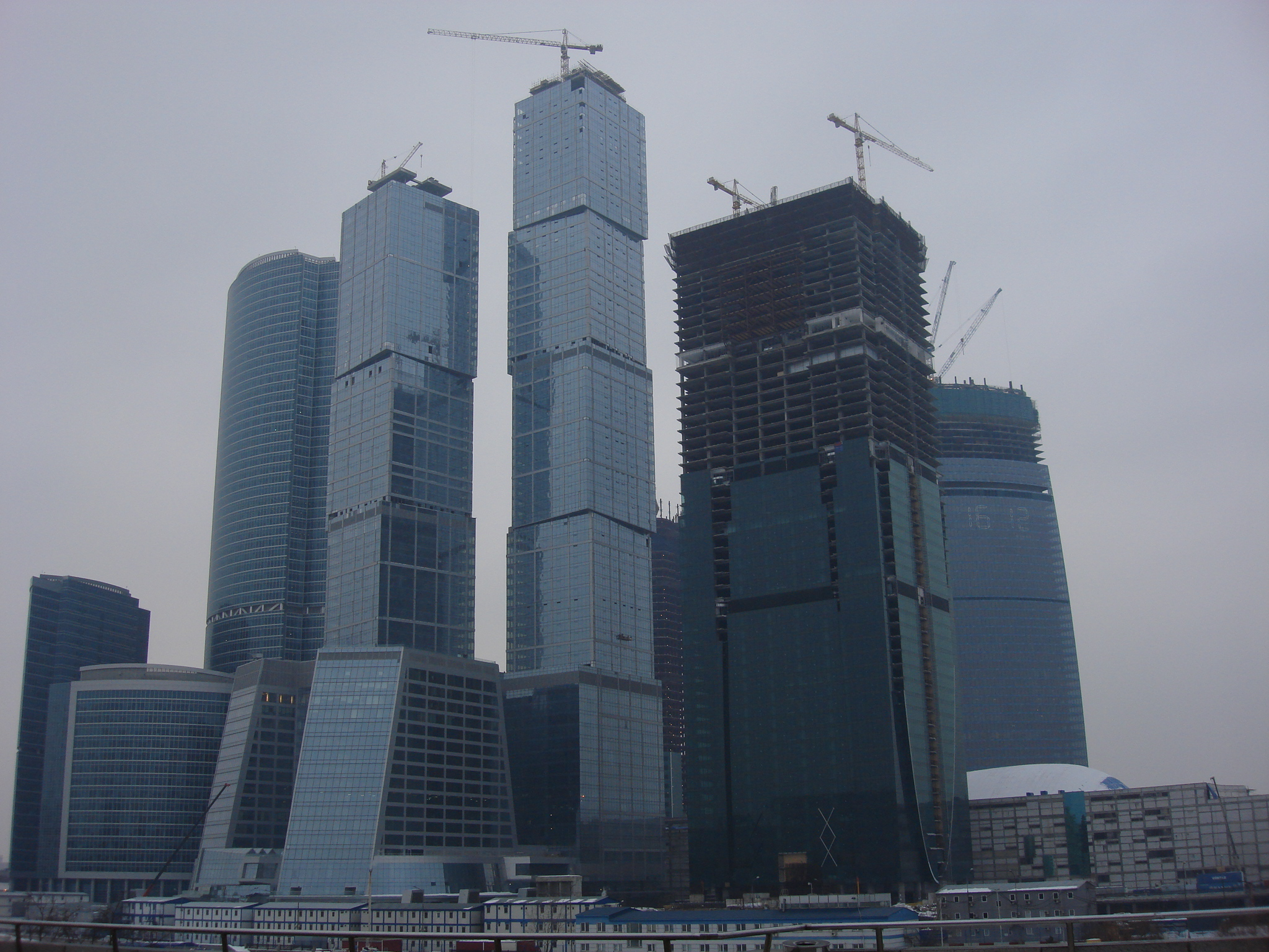 Московский международный деловой центр «Москва-Сити»